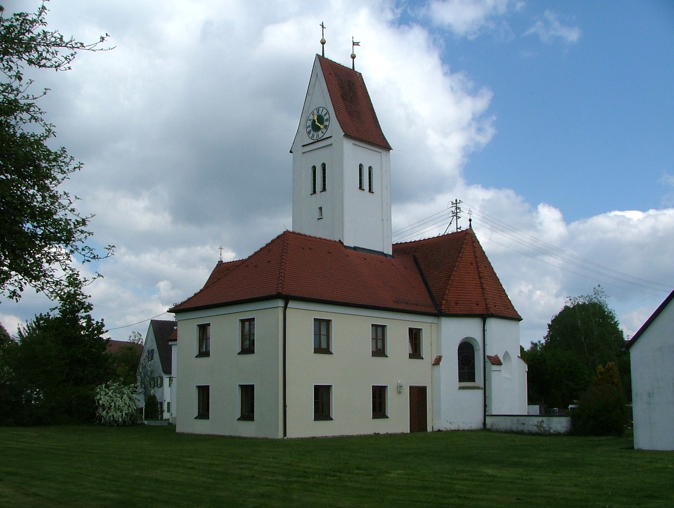 Pfarrkirche Mohrenhausen